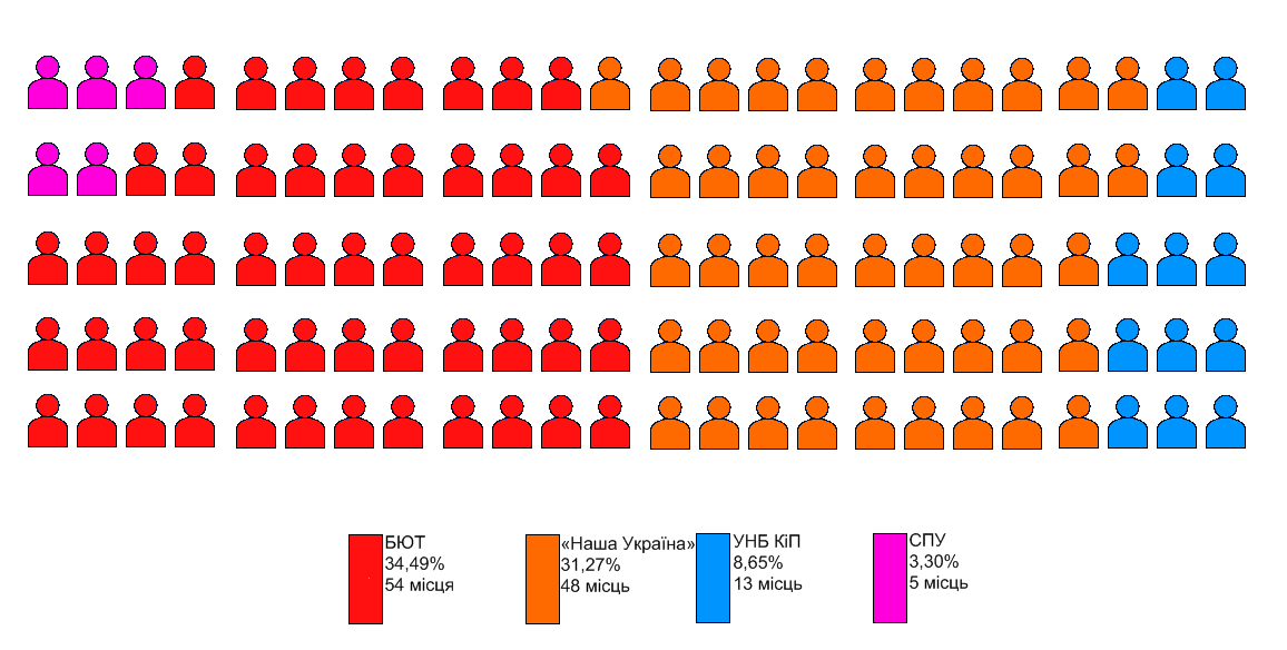 Розподіл депутатських мандатів у Тернопільській обласній раді за результатами виборів до Тернопільської обласної ради 2006 року